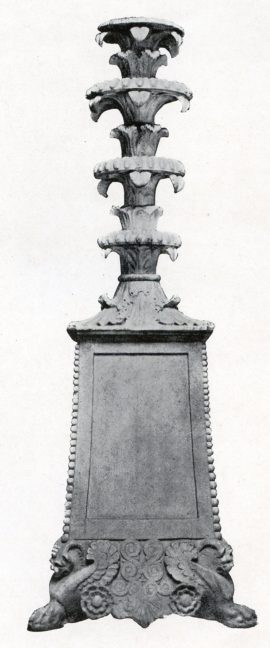 Candélabre découvert dans les fouilles de l'épave de Mahdia